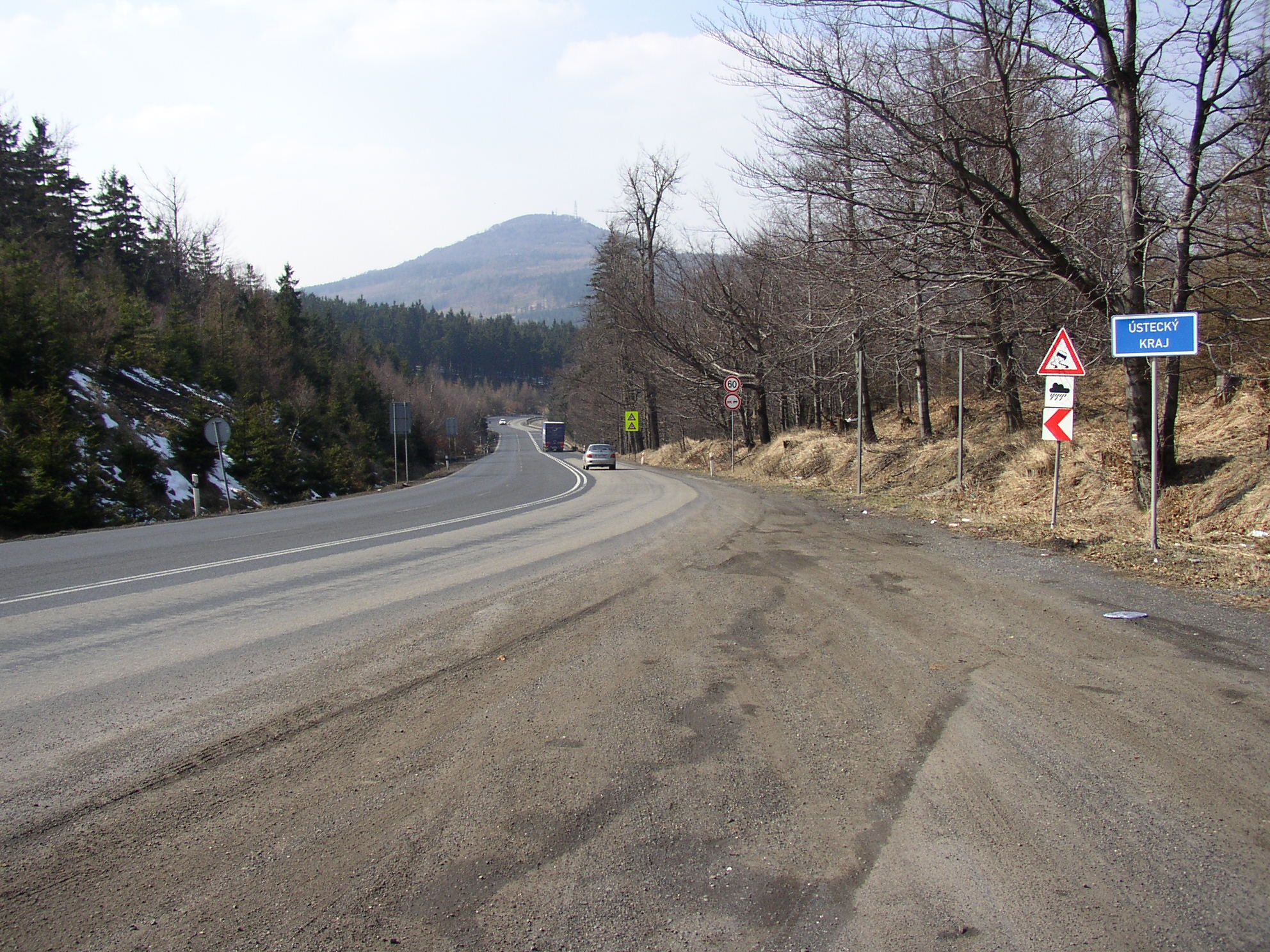 Stožecké sedlo, silnice I/9, v pozadí Jedlová. Vlevo od silnice katastrální území Rozhled (Jiřetín pod Jedlovou), vpravo od silnice k. ú. Dolní Podluží, poloha fotoaparátu u hranice k. ú. Horní Světlá pod Luží (obec Mařenice) a Svor